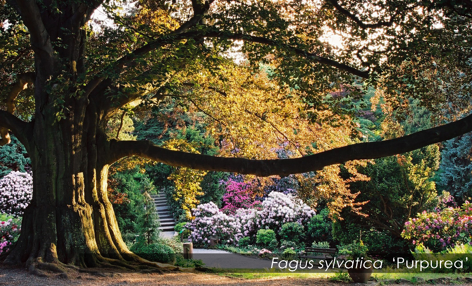 Buk pospolity forma purpurowa (Fagus sylvatica f. purpurea)